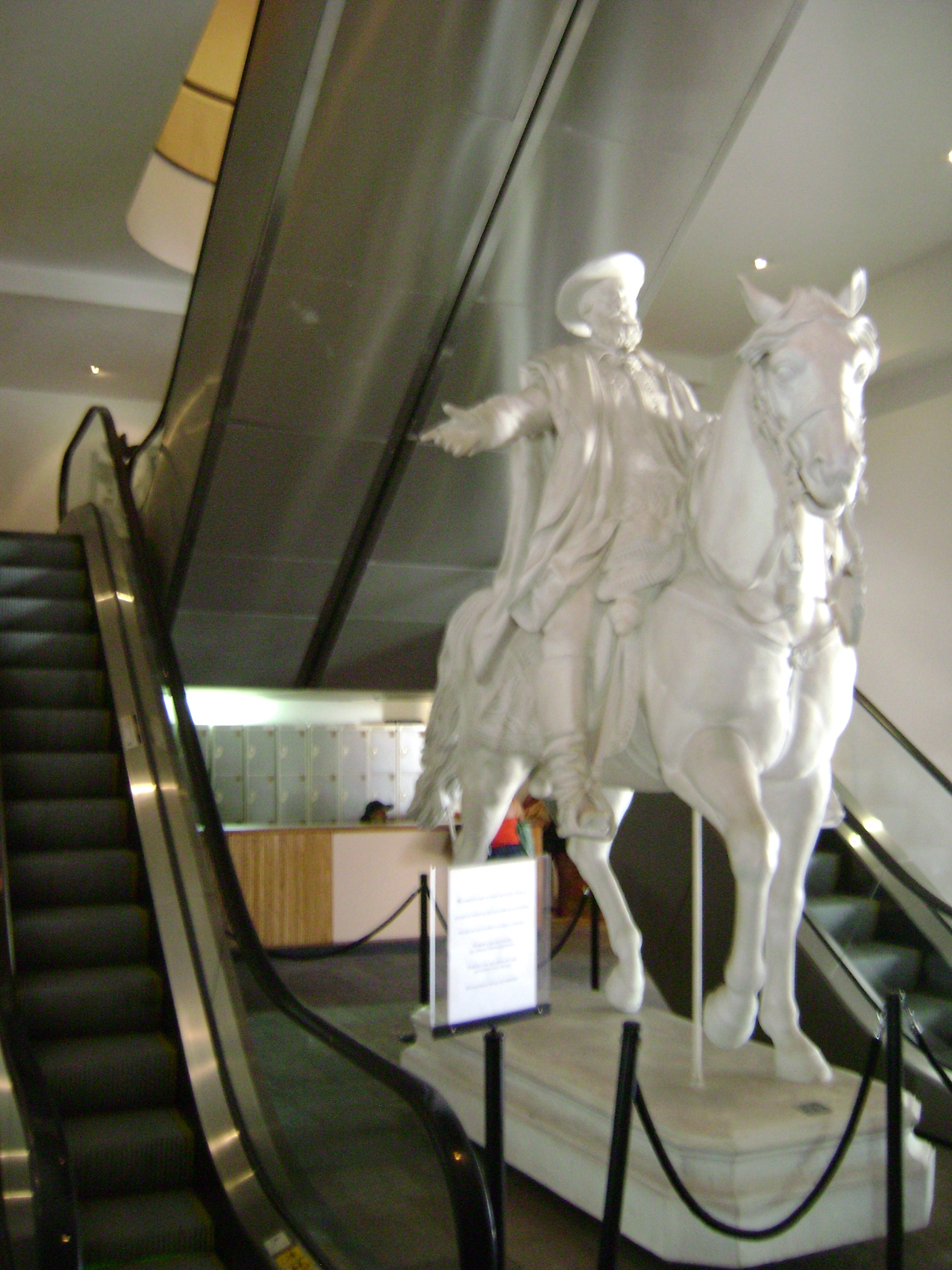 Escultura eqüestre de D. Pedro II, de Francisco Manoel Chaves Pinheiro (gesso), no hall de acesso ao 2º pavimento do Museu Histórico Nacional, na cidade de Rio de Janeiro, Brasil. O museu permite fotografias desde que não tenham flash, como mostrado em museupermissoes.jpg.